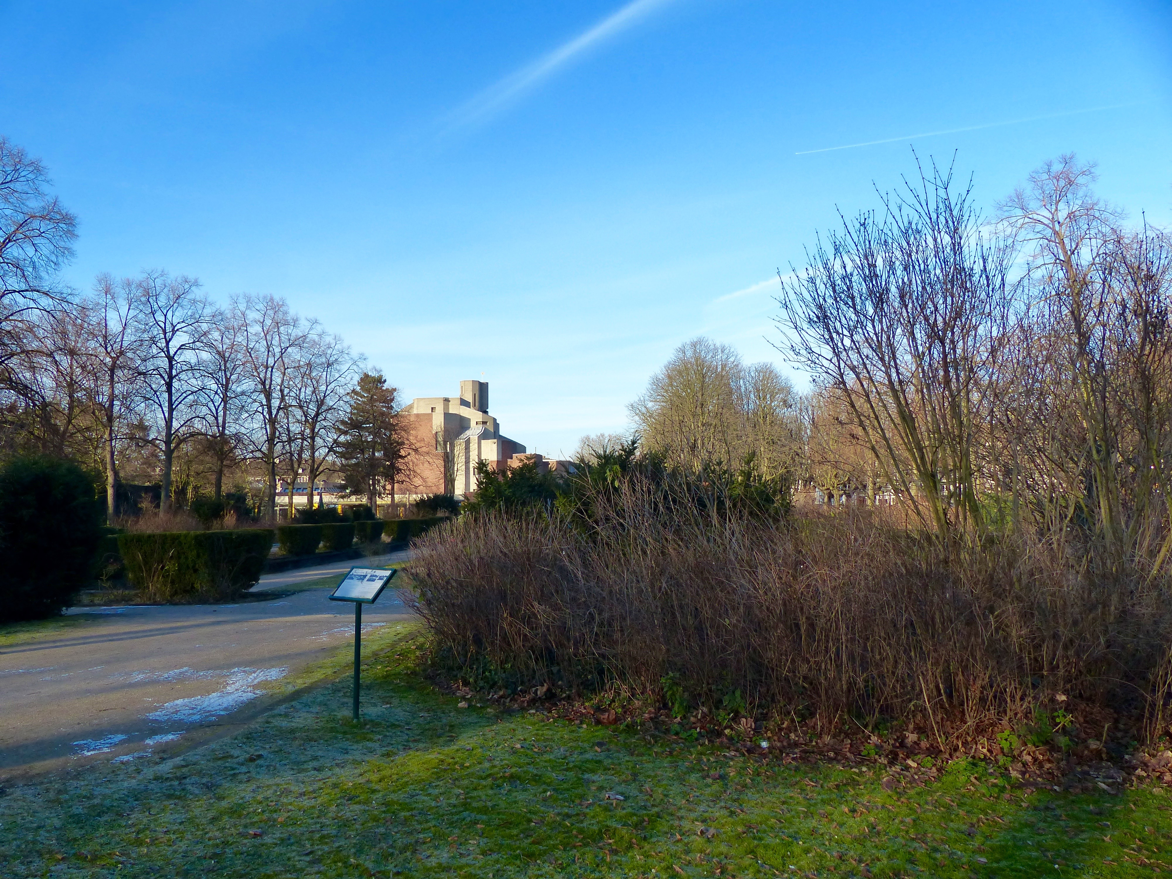 Köln-Lindenthal: Karl-Schwering-Platz mit der Kirche Christi Auferstehung